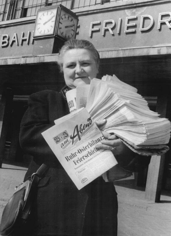 Zentralbild Weiß 31.3.1959 10 Jahre Postzeitungsvertrieb Am 1.4.1959 kann der Postzeitungsvertrieb auf sein 10jähriges Bestehen zurückblicken. UBz: Helene Pohling, hier vor dem Stützpunkt Friedrichstrasse der PZV-Händlerstelle Spandauer Str., ist seit 1949 Zeitungshändlerin und gehört seit 1951 dem PZV an. Seit langem versieht sie ihren Dienst auf der Nord- Süd-Strecke der S-Bahn.